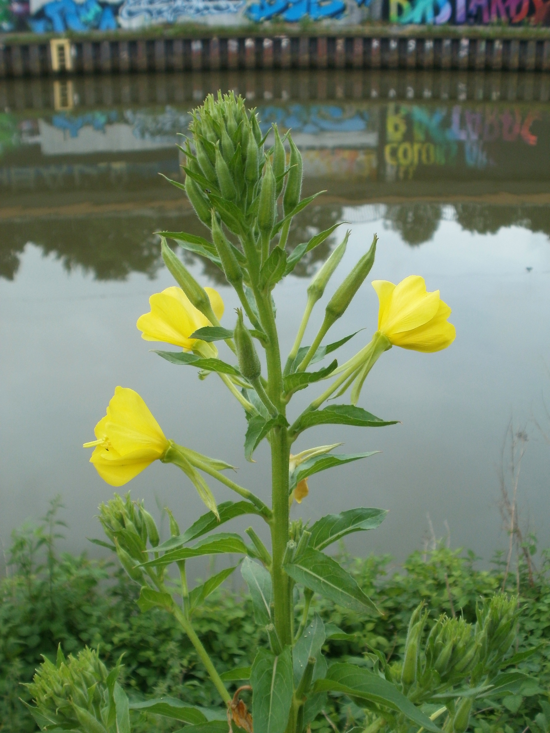 Nachtkerze am Staden (Saarbrücken)